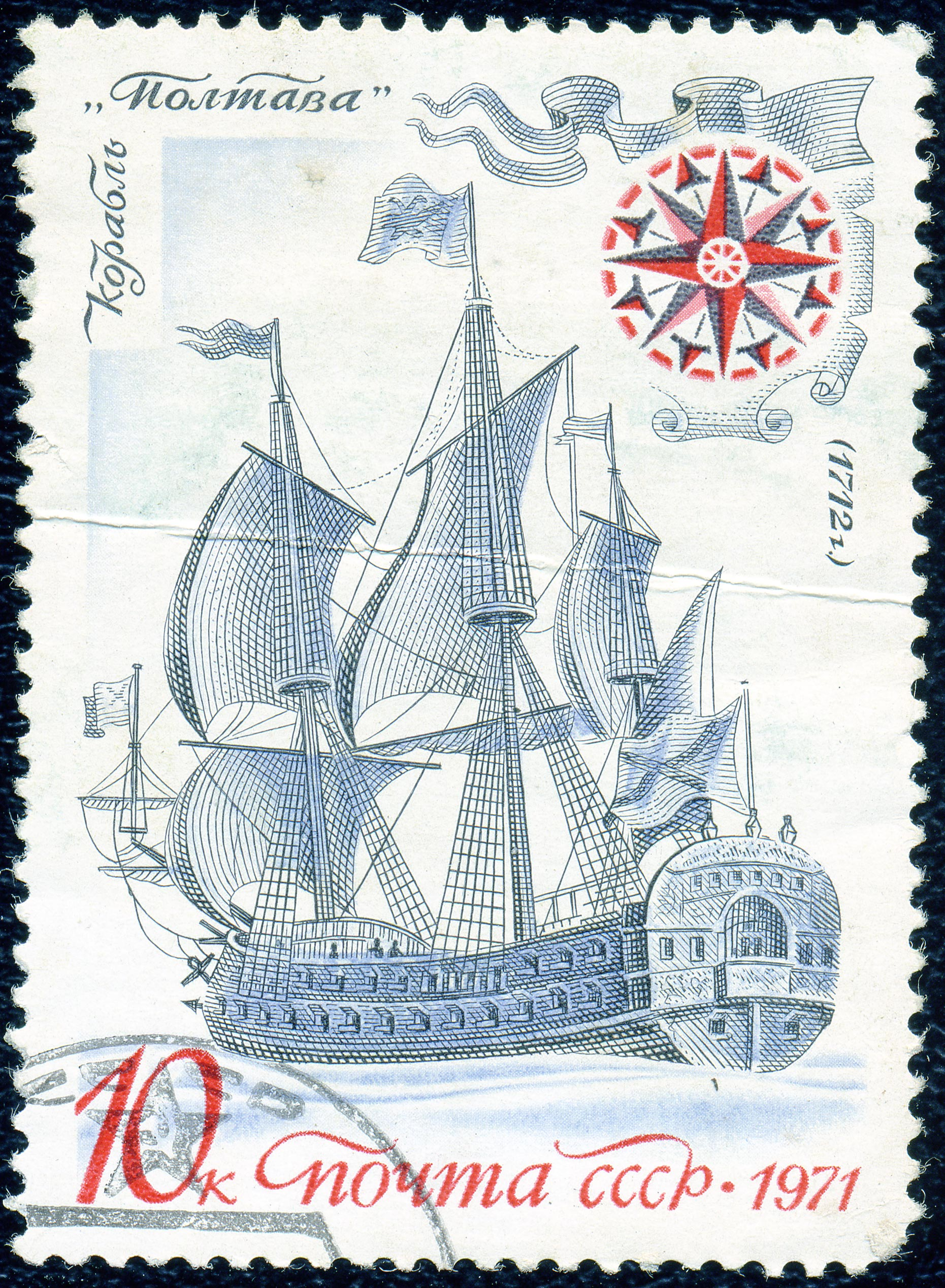 Почтовая марка СССР. 1971. Полтава